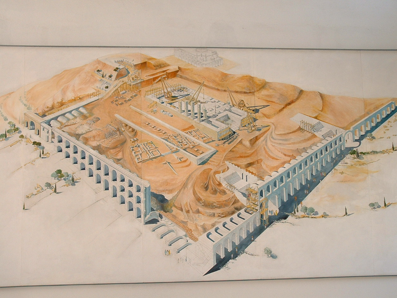 Plan de construction de Carthage, musée de la Cathédrale St Louis (Acropolium) à Carthage)